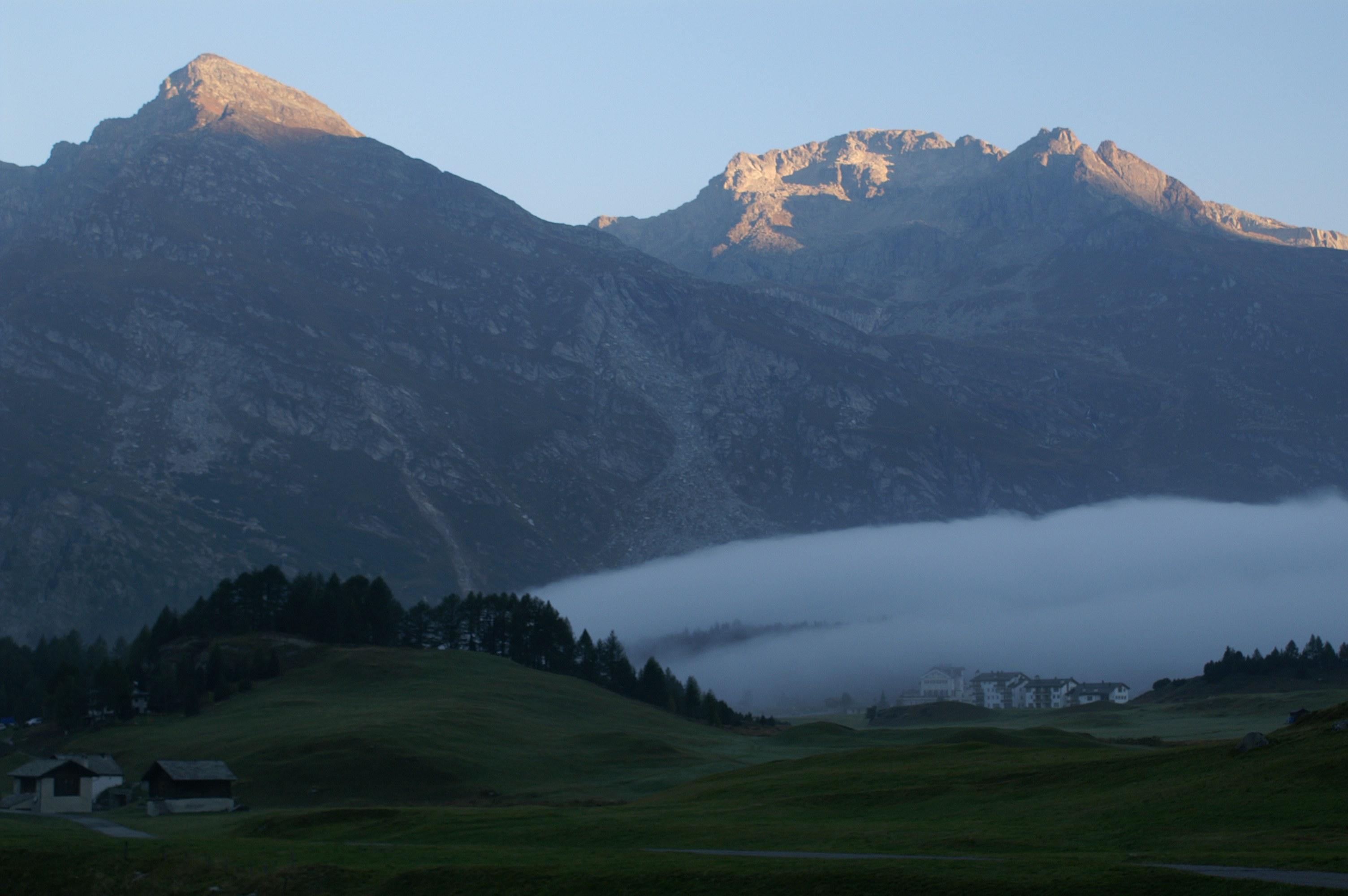 Maloja, Schweiz, meteorologisches Phänomen im Herbst: die „Maloja-Schlange“